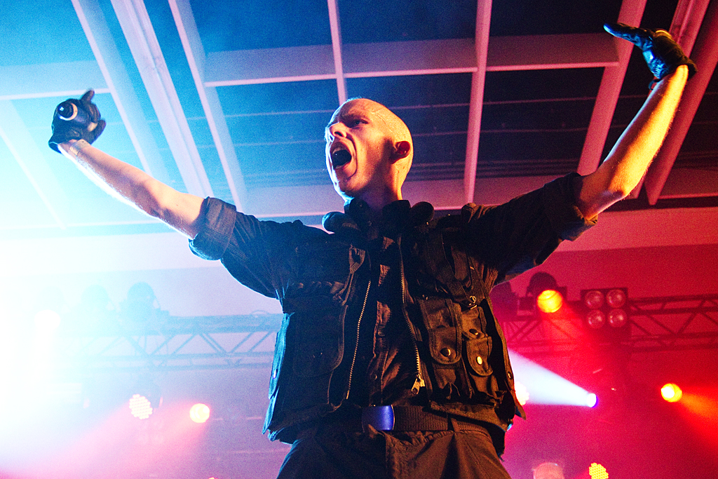 Aufnahme von Grendel auf dem Amphi Festival 2013 in Köln, Deutschland